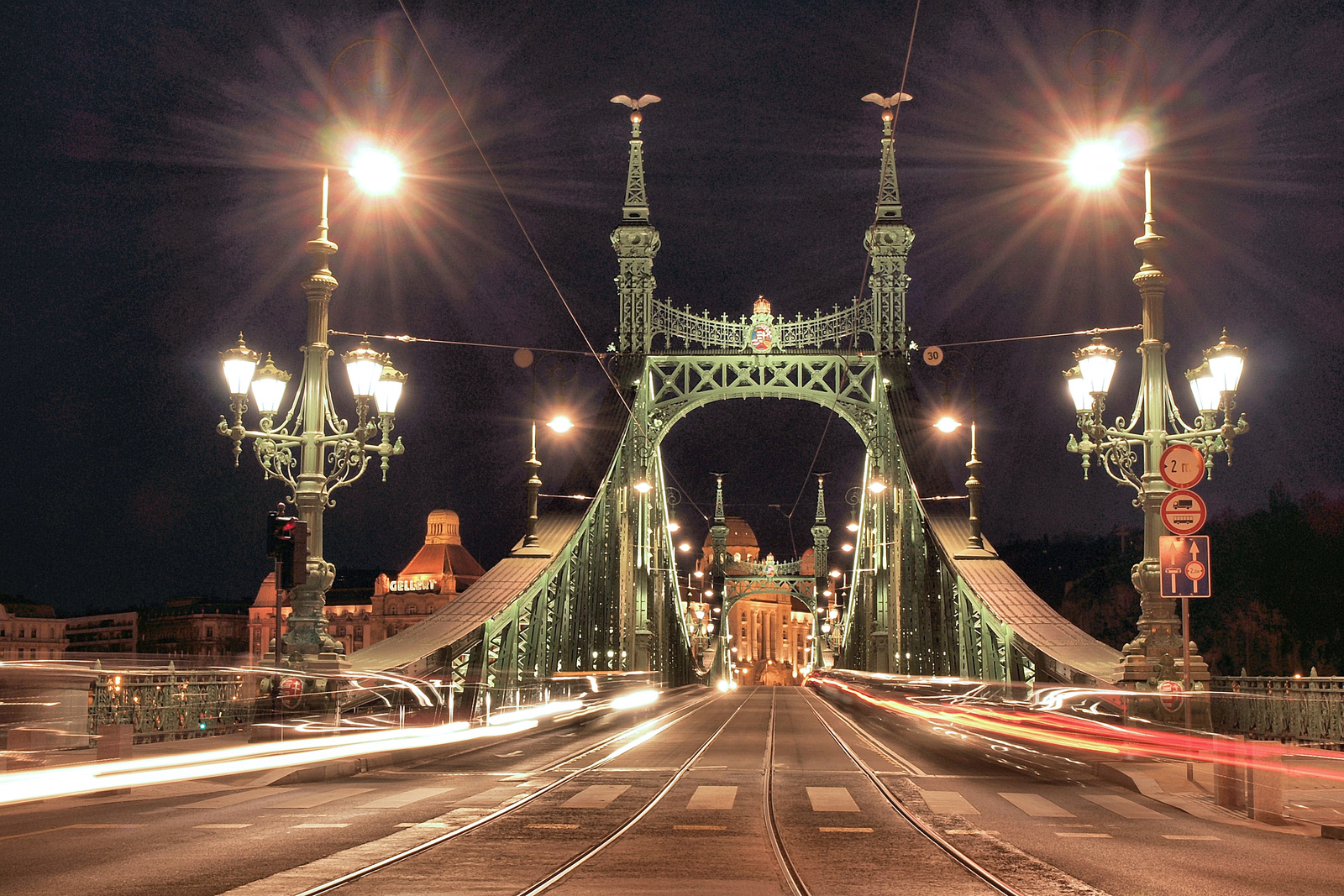 Szabadság híd (Budapest, Fővám tér) This is a photo of a monument in Hungary. Identifier: 410